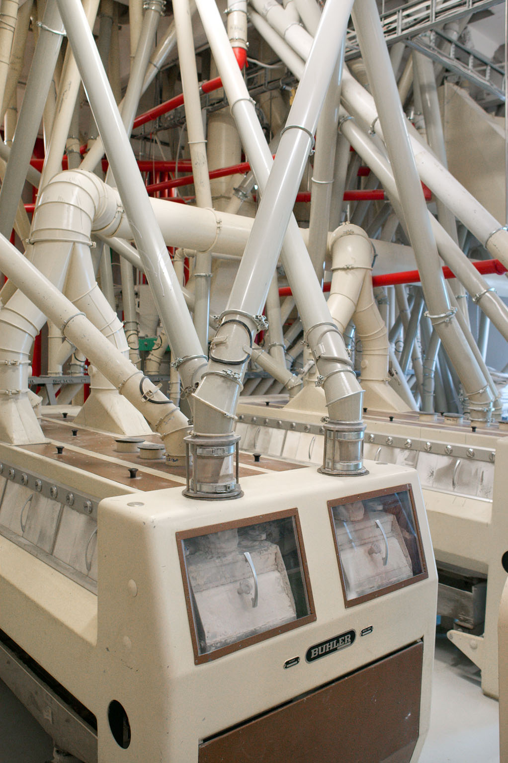 Tartu Mill